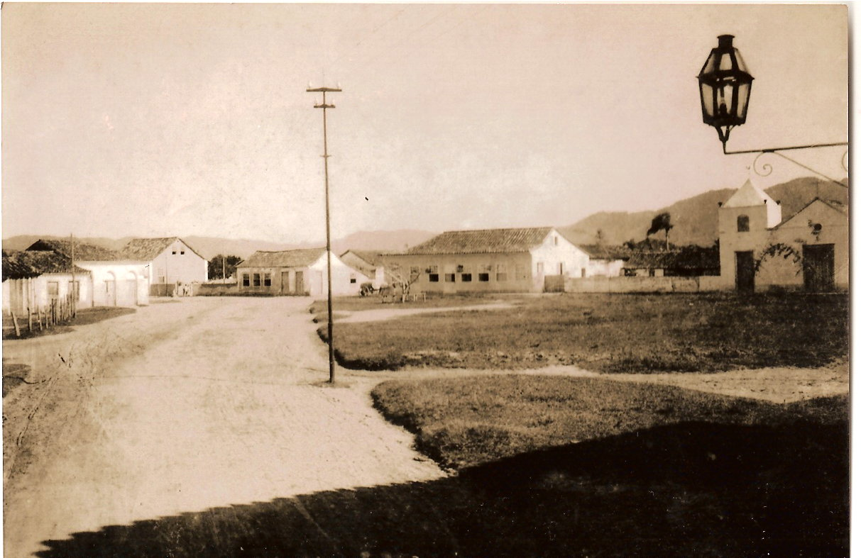 Foto da Praça 15 de Novembro de Palhoça registrada em 1928 para a o acervo da Prefeitura Municipal